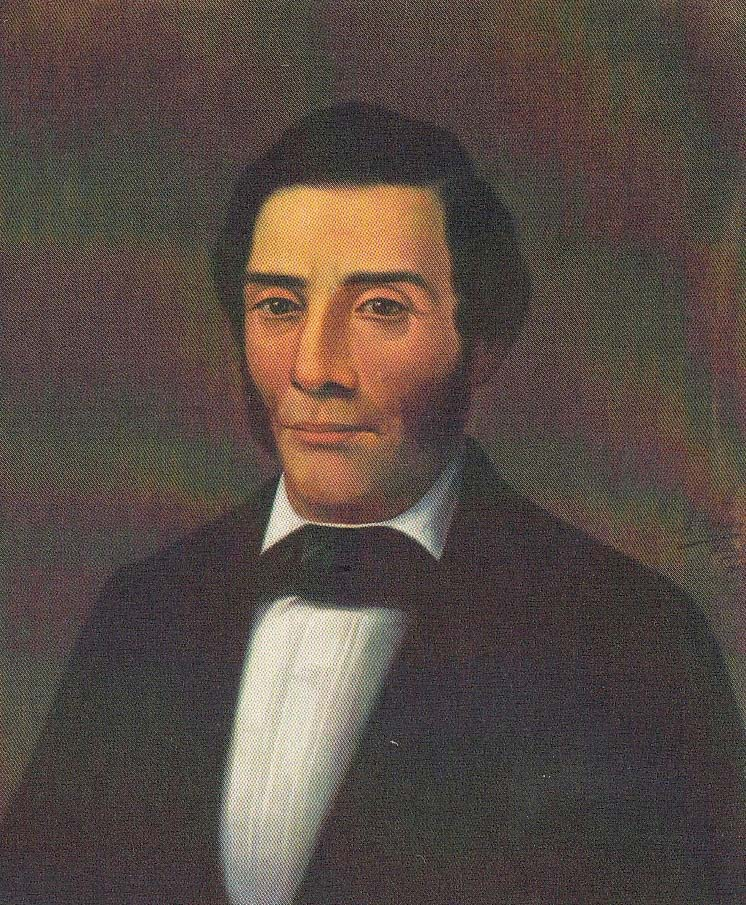 Retrato de José María Parras, primer gobernador del estado mexicano de Nuevo León. Resguardado en el Archivo Histórico de Monterrey